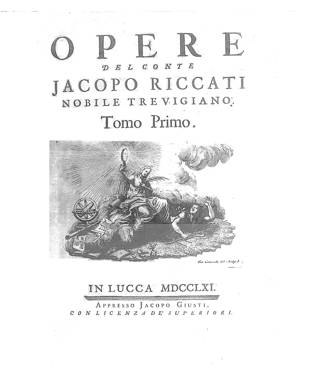 Opere del conte Jacopo Riccati nobile Trevigiano. Tomo primo [-quarto]. 1. - In Lucca : appresso Jacopo Giusti, 1761. - 598, [2], p., [8] c. di tav. : ill. .